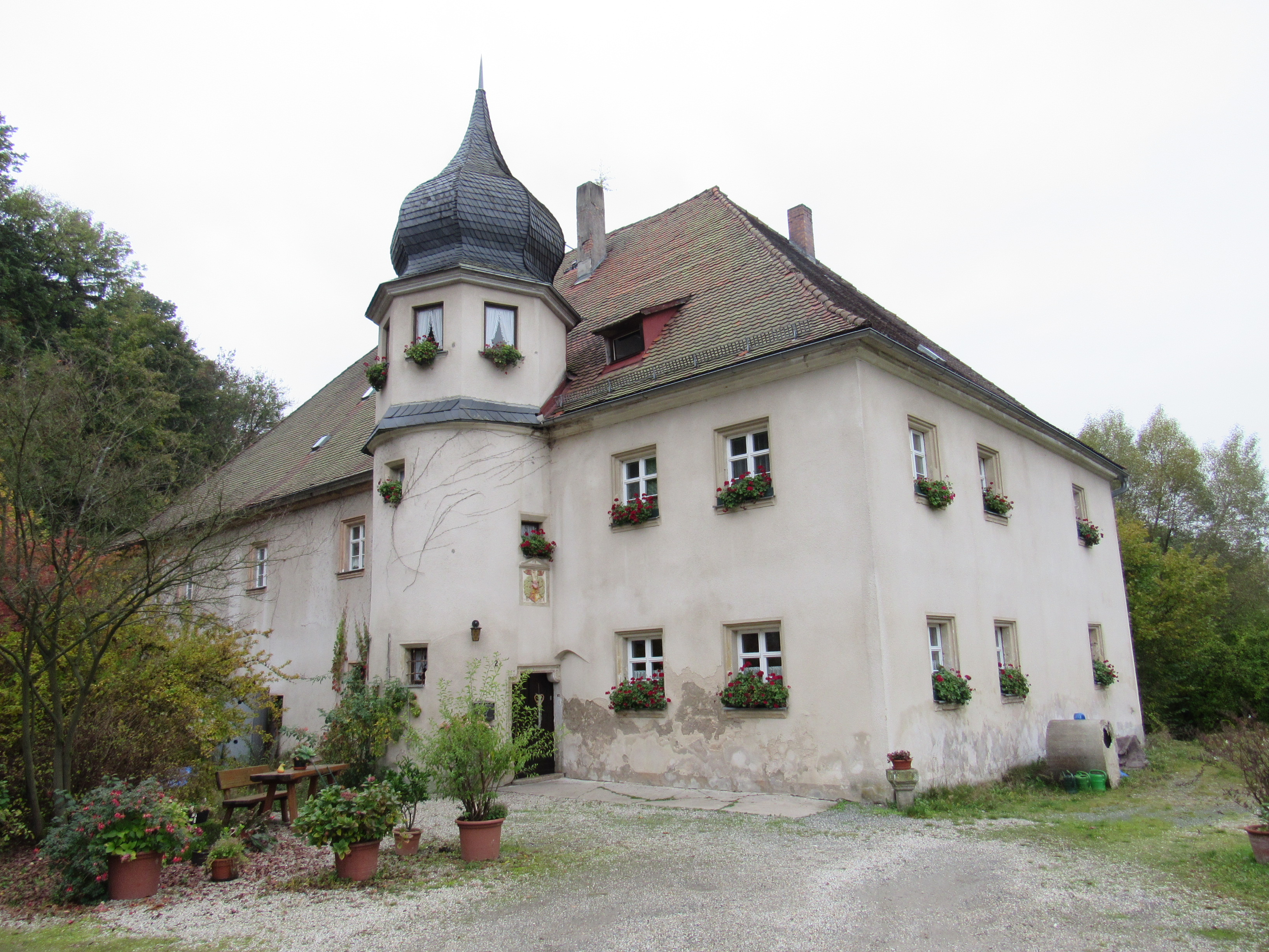 Hammerherrenschloss Rosenhammer in Weidenberg